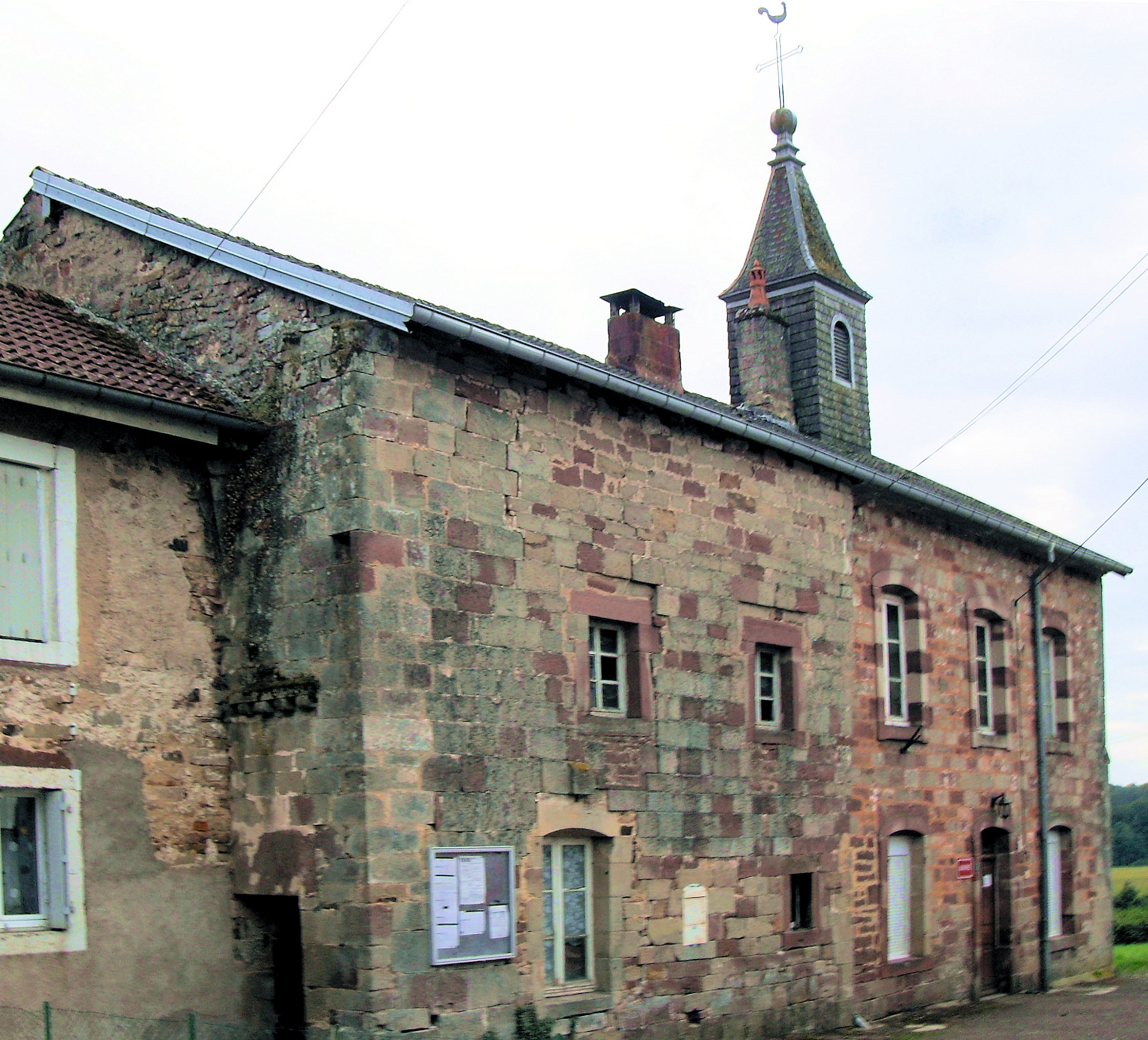 La mairie de Fleurey-lès-Saint-Loup dans les anciens bâtiments du prieuré